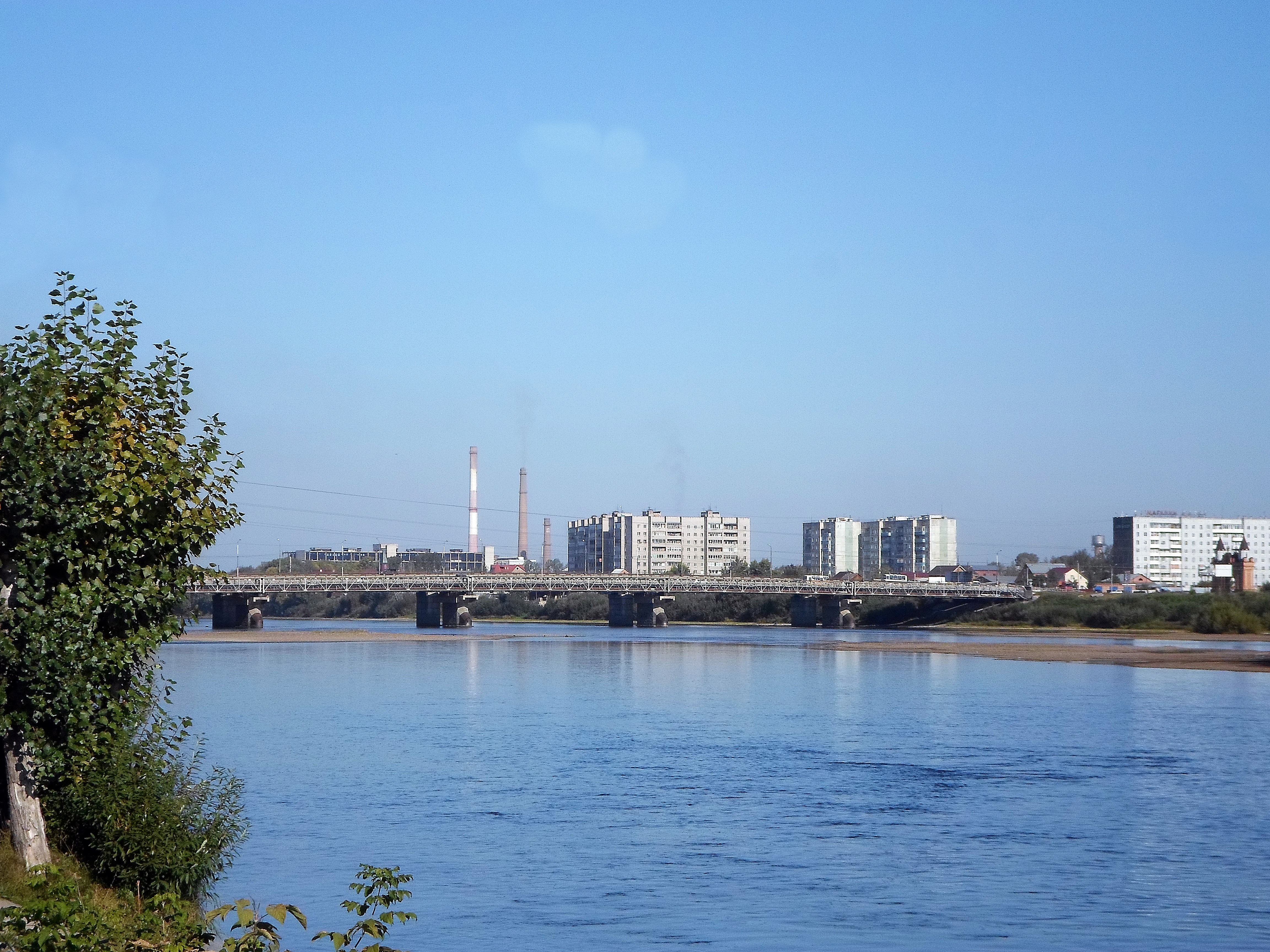 Автомобильный мост через реку Кан в центре Канска. Красноярский край.